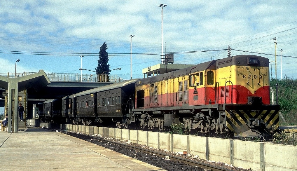 FCGMB